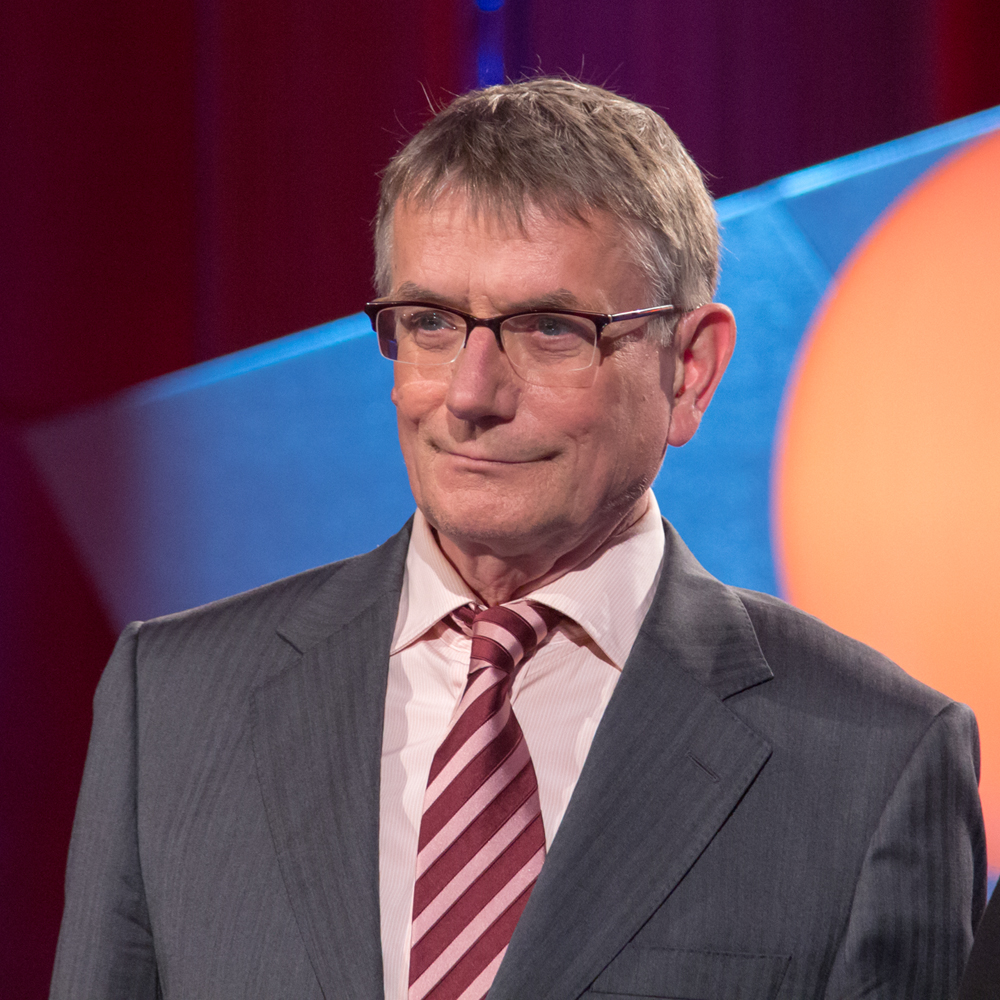 Journalist Jörg Armbruster, Preisträger des Hanns-Joachim-Friedrich-Preises 2013